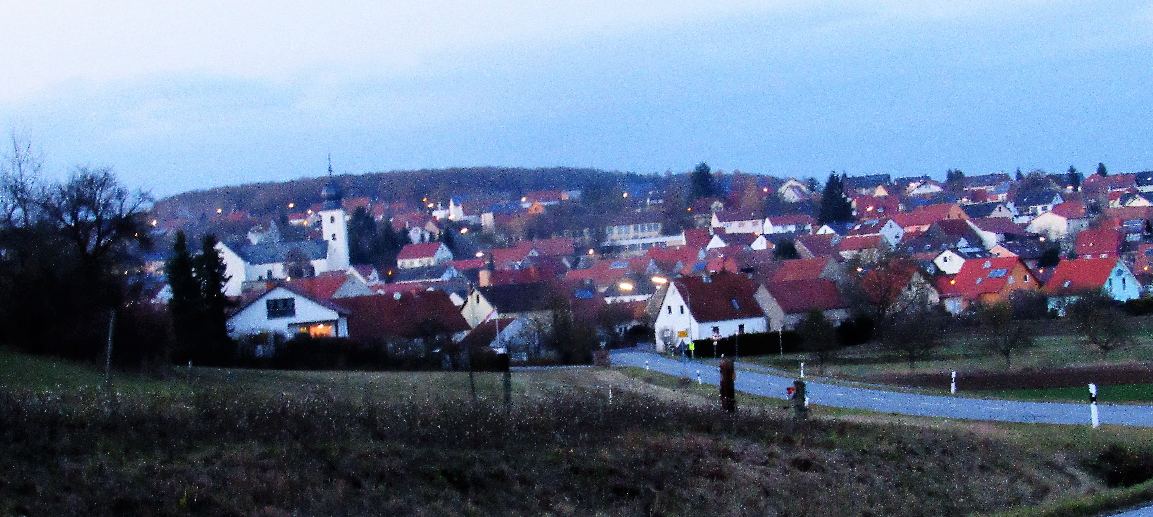 Rottershausen von Südwesten